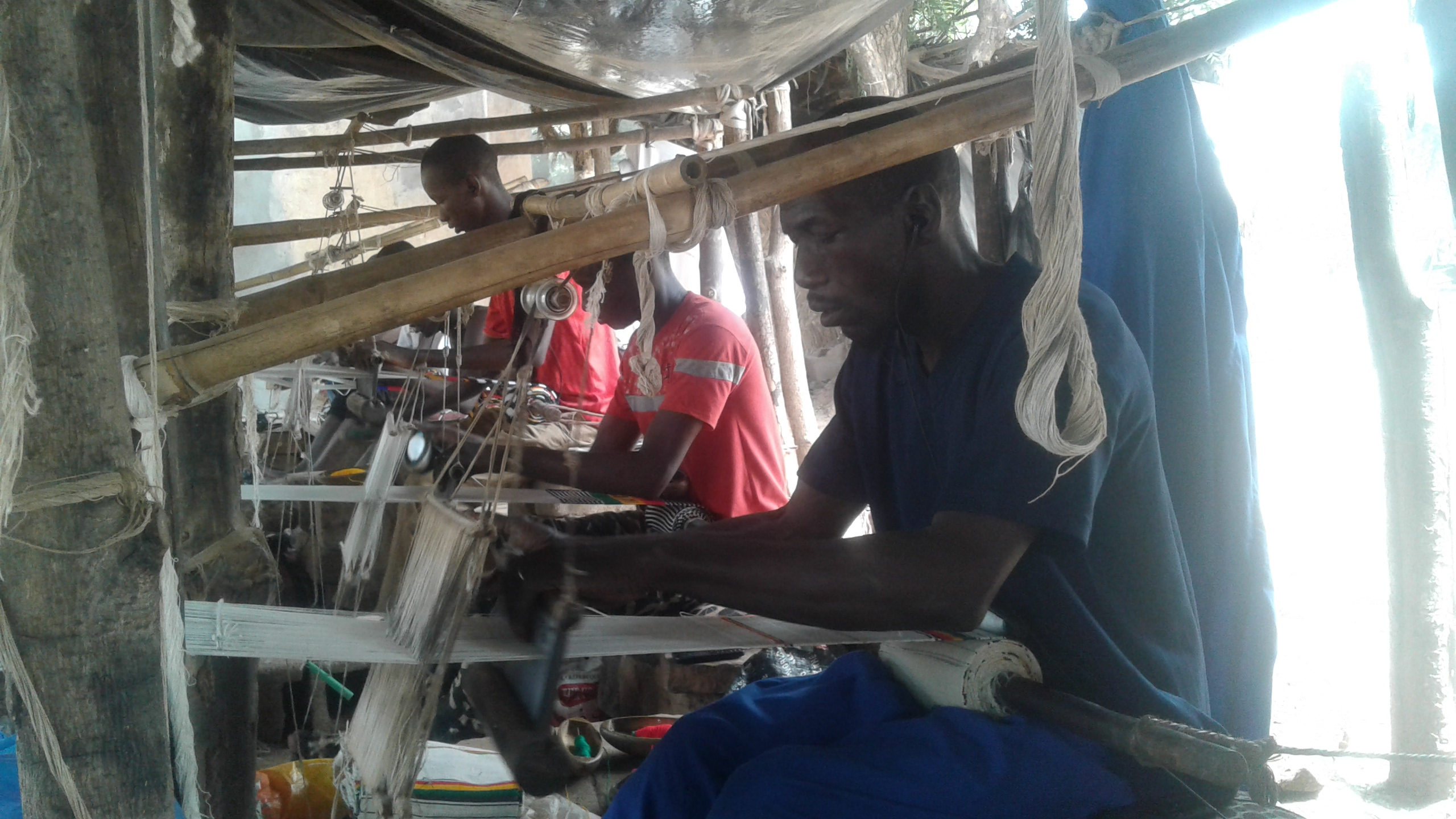 Groupe de Tisserands au travail dans leur atelier. This is an image of "African people at work" from Mali